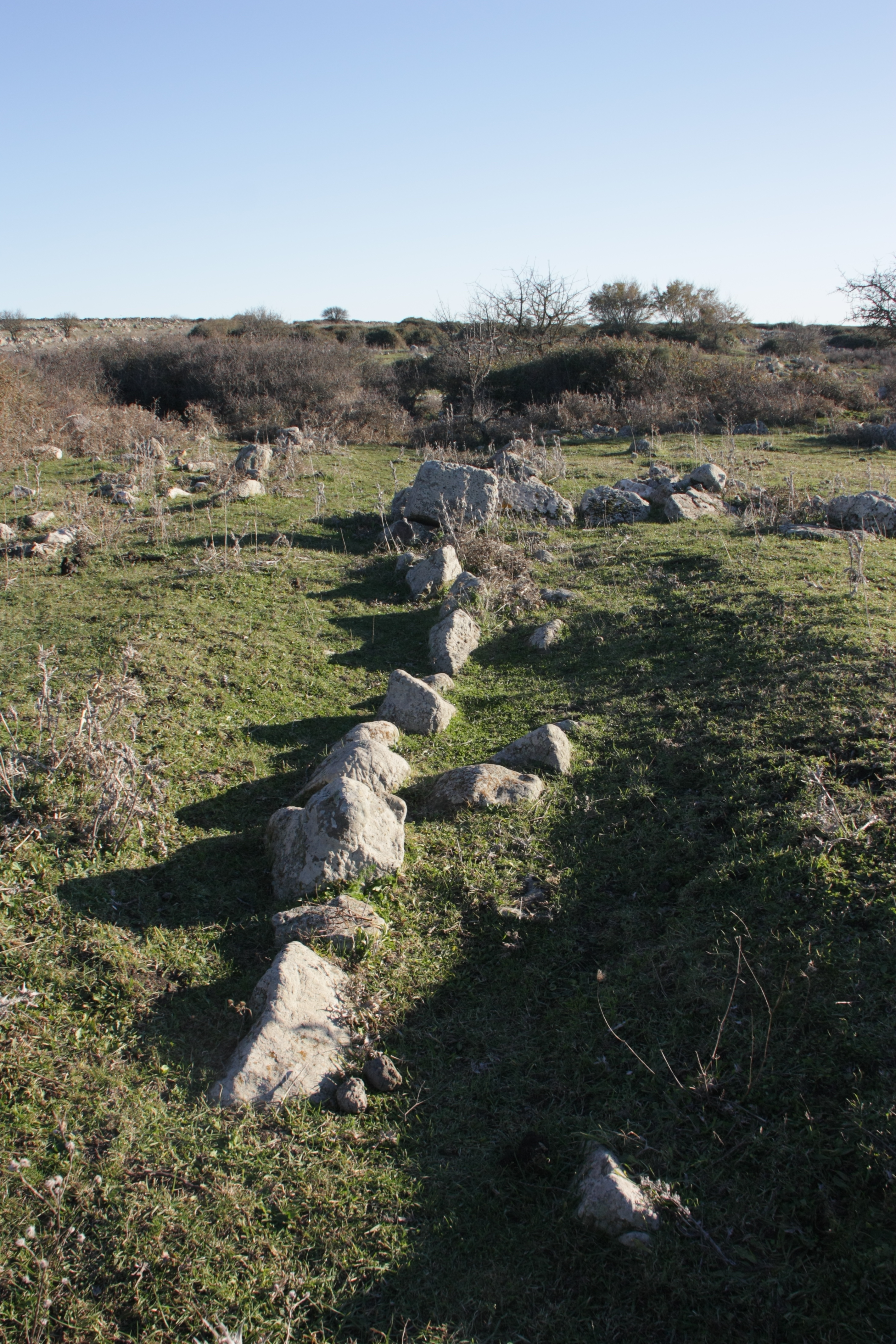 Casmene